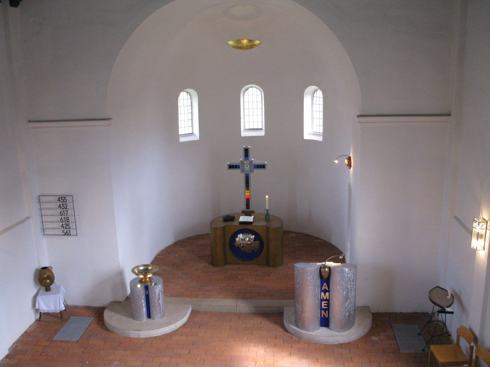 Blick von der Orgelempore auf das gesamte Ensembel im Chorraum der Kirche Küsten mit Altar, Taufe und Kanzel